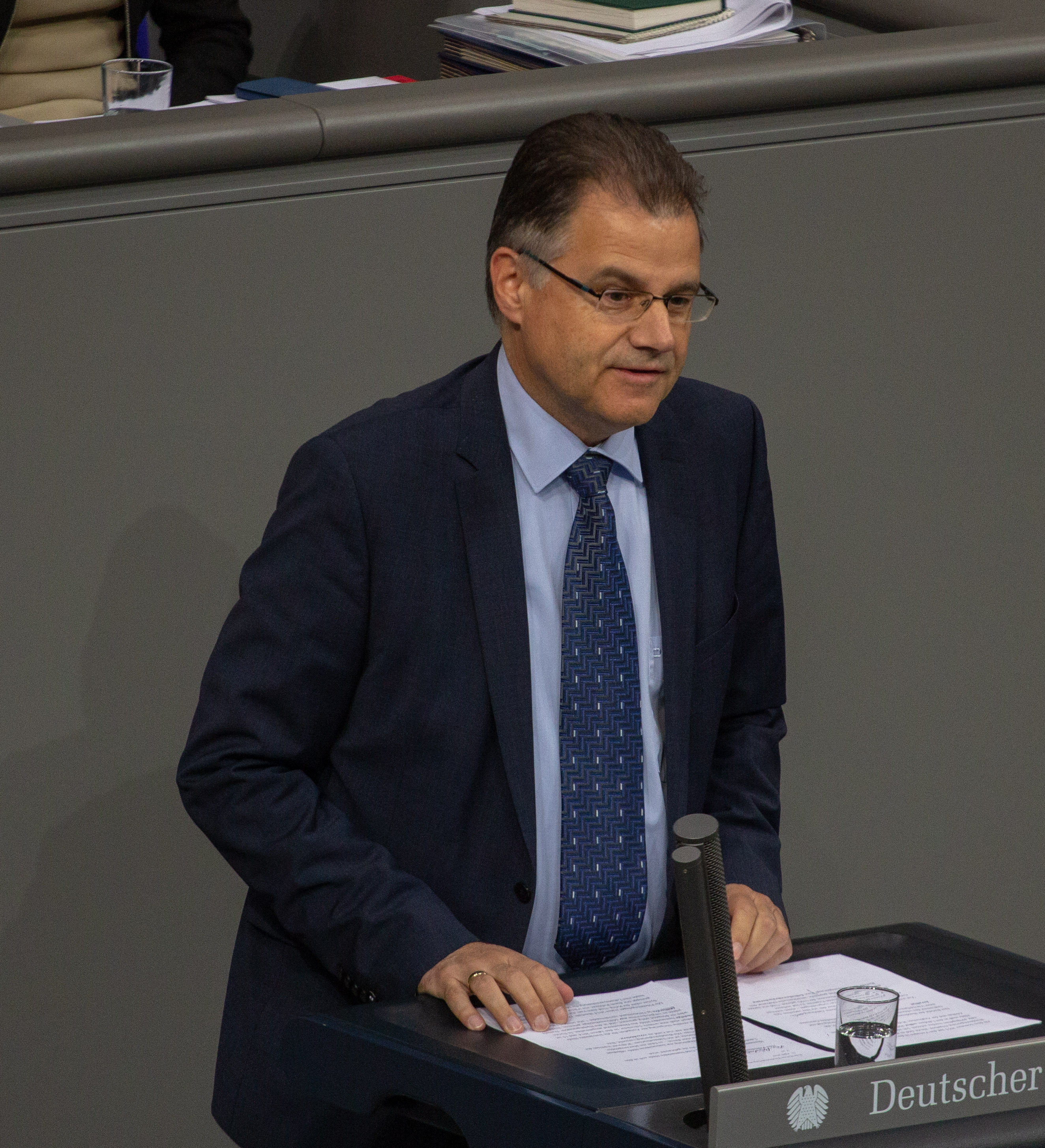 Jürgen Braun, Mitglied des Deutschen Bundestages, während einer Plenarsitzung am 11. April 2019 in Berlin.